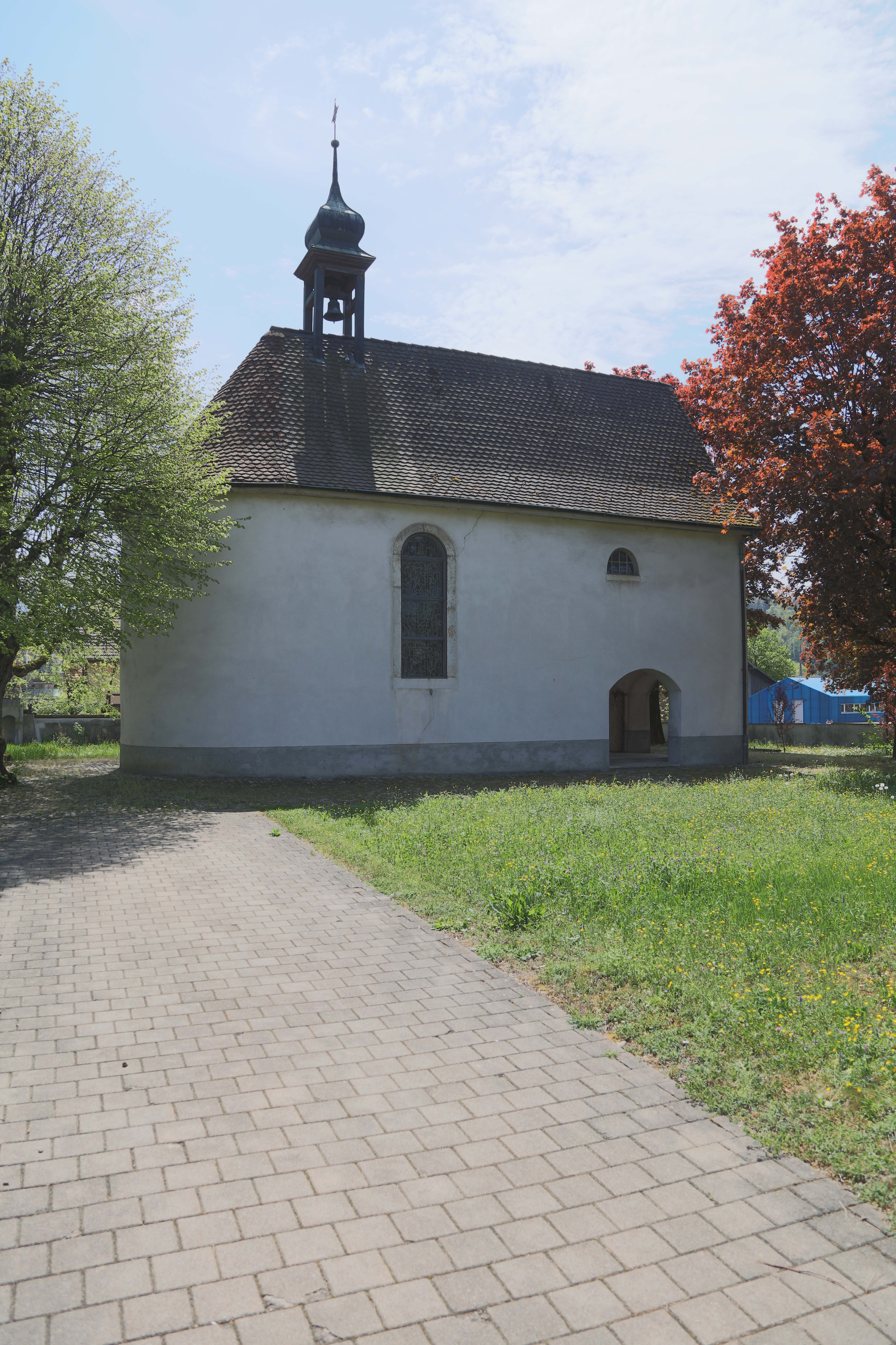 Die Friedhofskappele St.Martin war die ehemalige Pfarrkirche der Region Laufen. Die nach dem sie 1637 im Dreissigjährigen Krieg beschädigt wurde, aufgegeben und 1809 als Friedhofskapelle neu aufgebaut wurde.